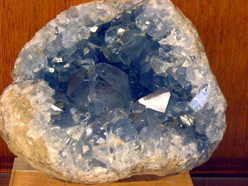 Celestine in a vug